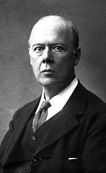 Houston Stewart Chamberlain Porträt Houston Stewart Chamberlain Abgebildete Personen: Chamberlain, Houston Stewart: Schriftsteller (GND 118675508)